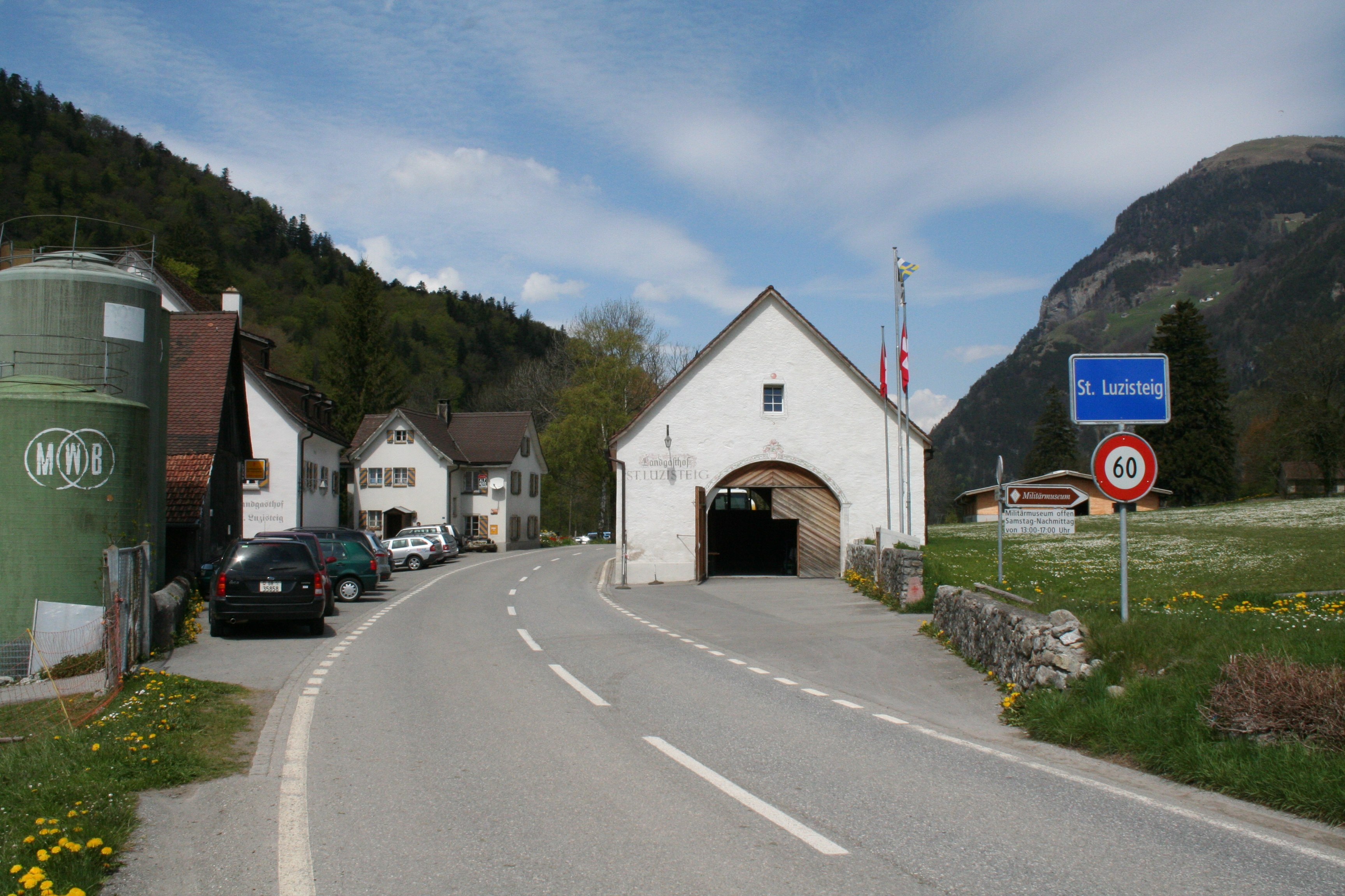 St. Luzisteig Richtung Norden